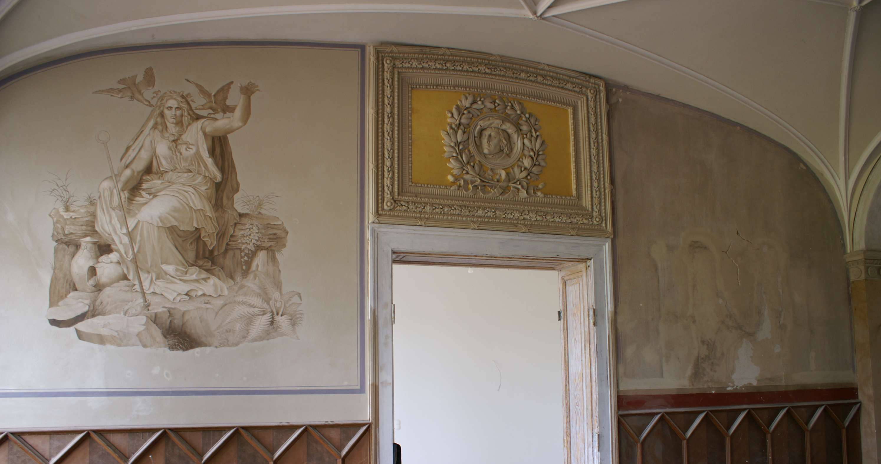 Kartlow Landkreis Demmin - Wandbild und Medaillon in der Eingangshalle